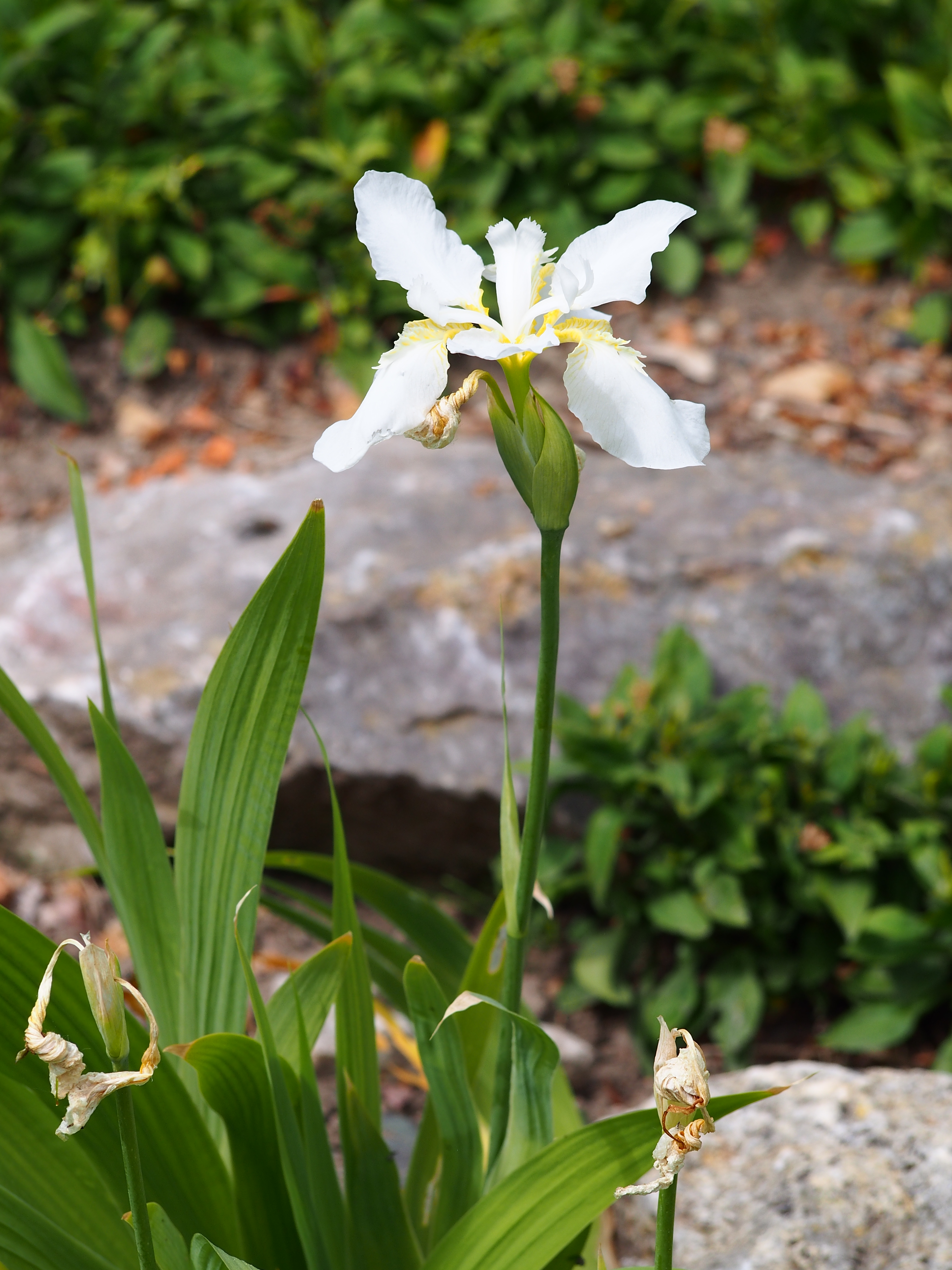 Kosaciec strzechowaty Iris tectorum 'Alba', kwitnący okaz. Ogród Botaniczny Uniwersytetu Wrocławskiego, Wrocław, Polska.